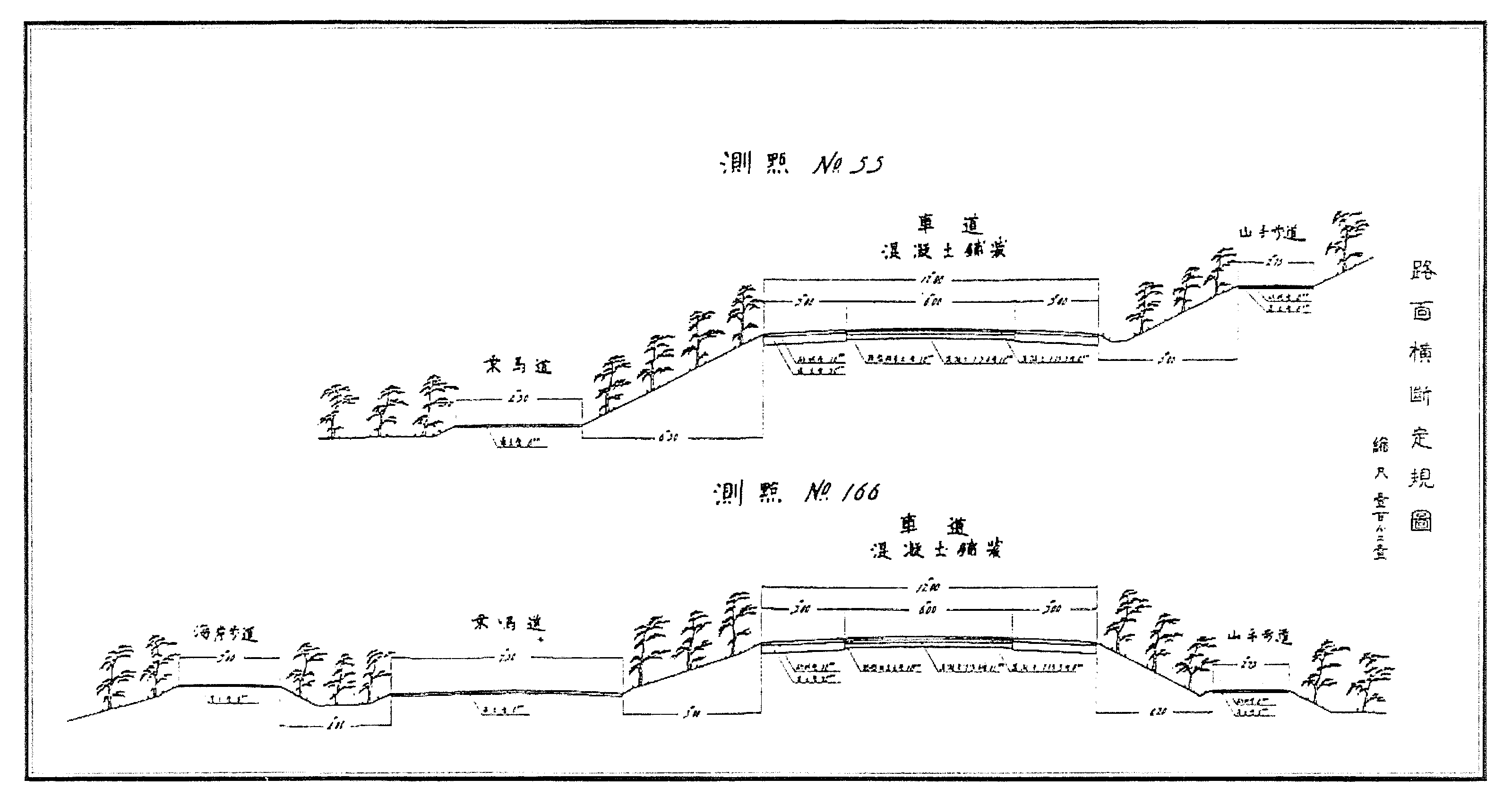 神奈川県道片瀬大磯線路面横断定規圖（断面図）